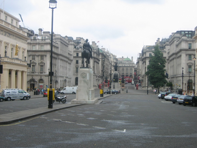 London : Lower Regent Street, London